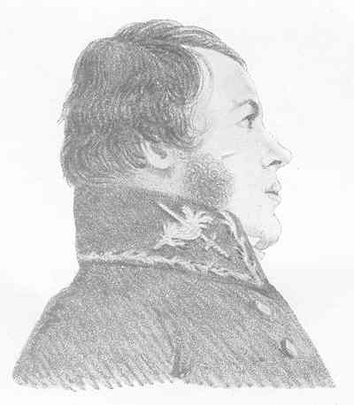 Clas Livijn, efter en anonym hanteckning, finns med Hallmans Livijn-studie från år 1909, då var handteckningen i släktens ägo.